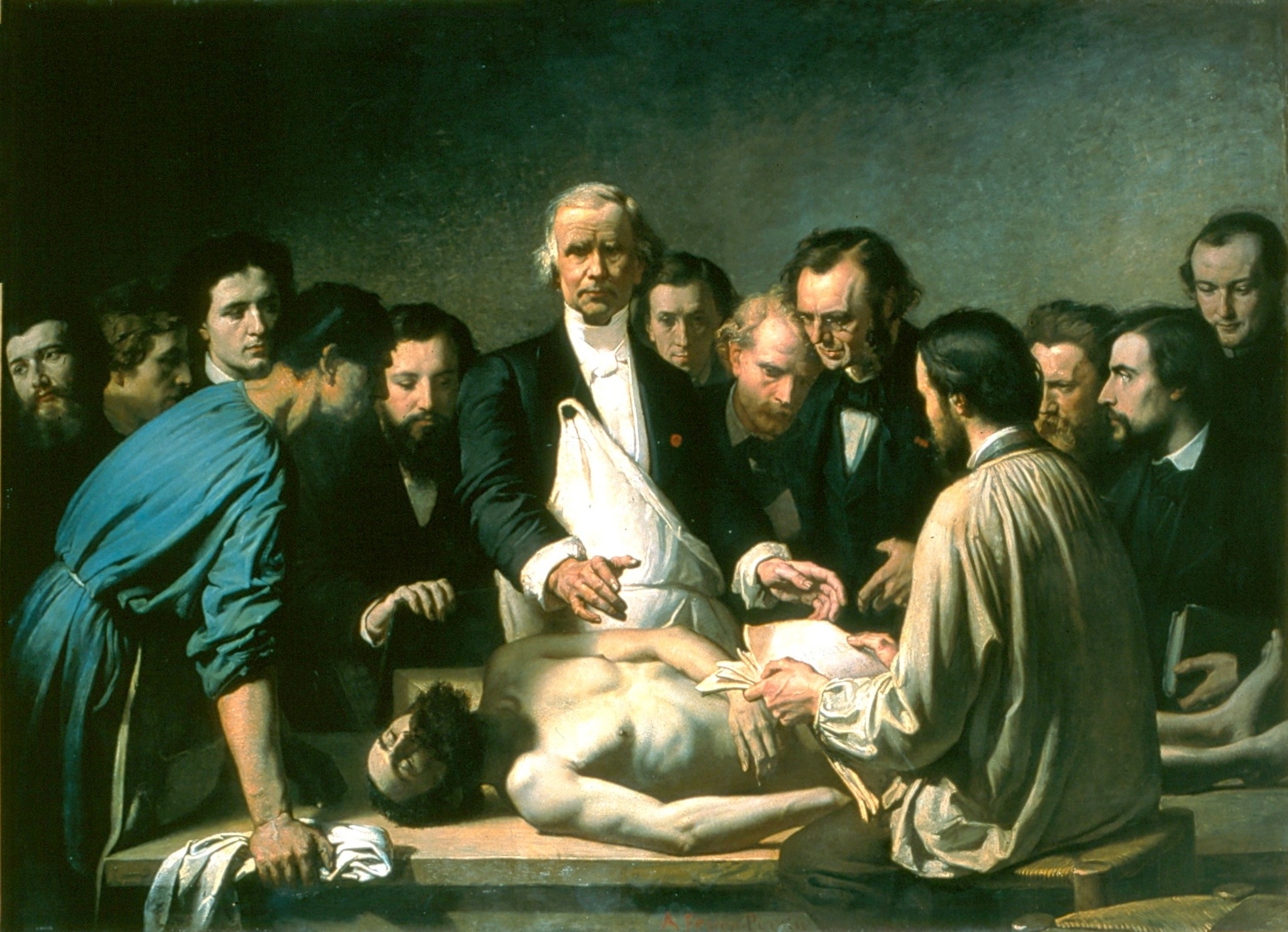 Painting of French surgeon and anatomist Alfred Velpeau (1795-1867) : "La Leçon d'anatomie de Velpeau à la Charité"